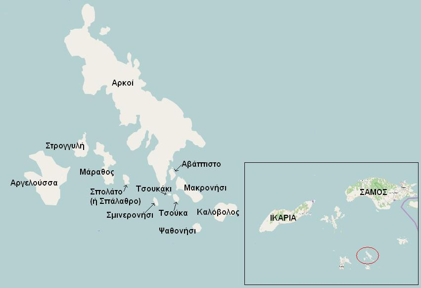 Νήσοι Αρκοί